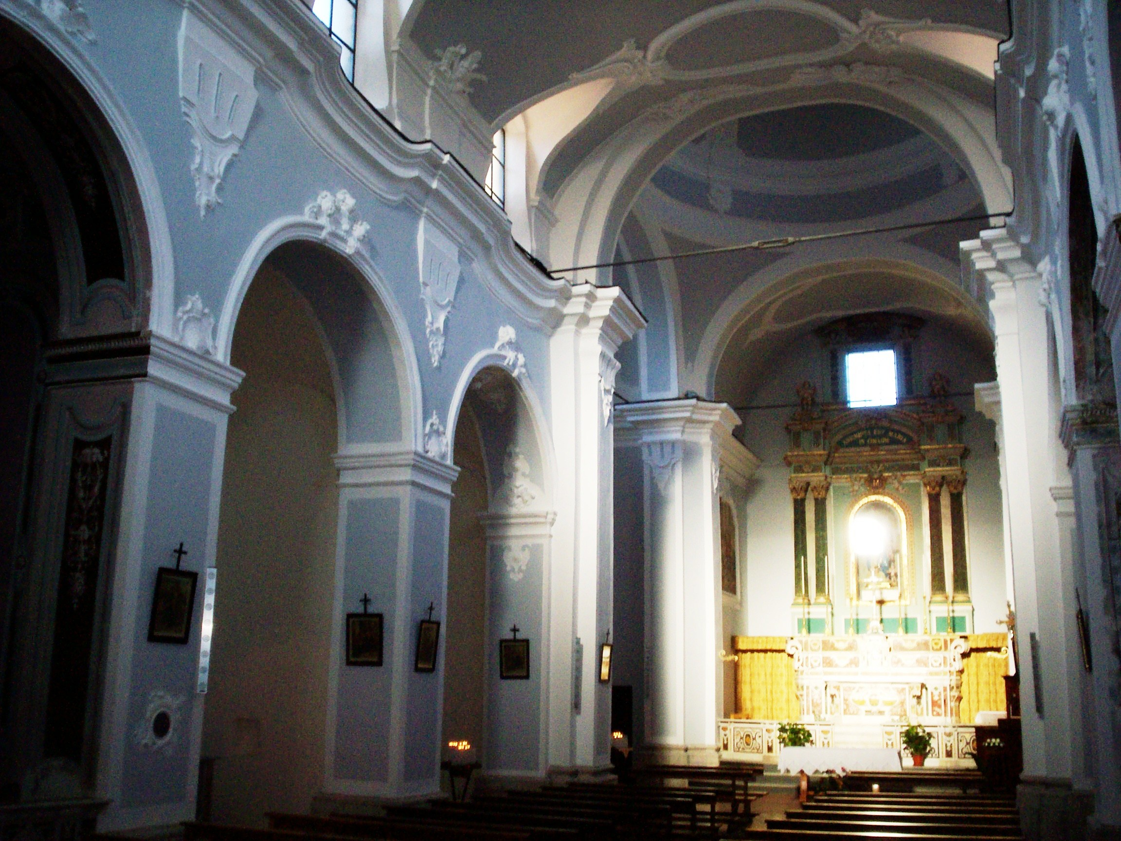 Interno della Chiesa di Santa Maria in Cerreto Sannita (Bn)